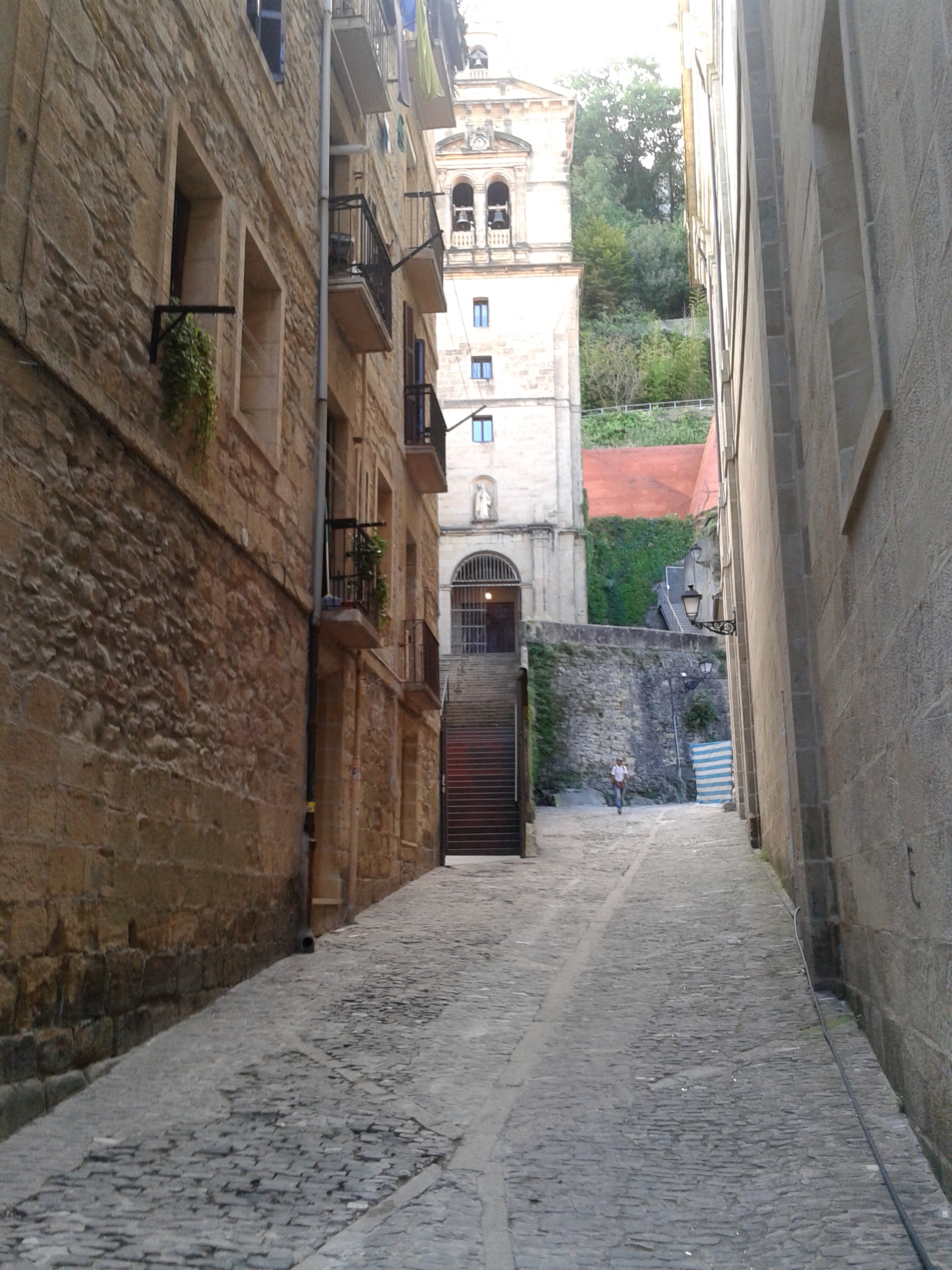 Elbira Zipitria kaleak Urgull mendira eramaten du.